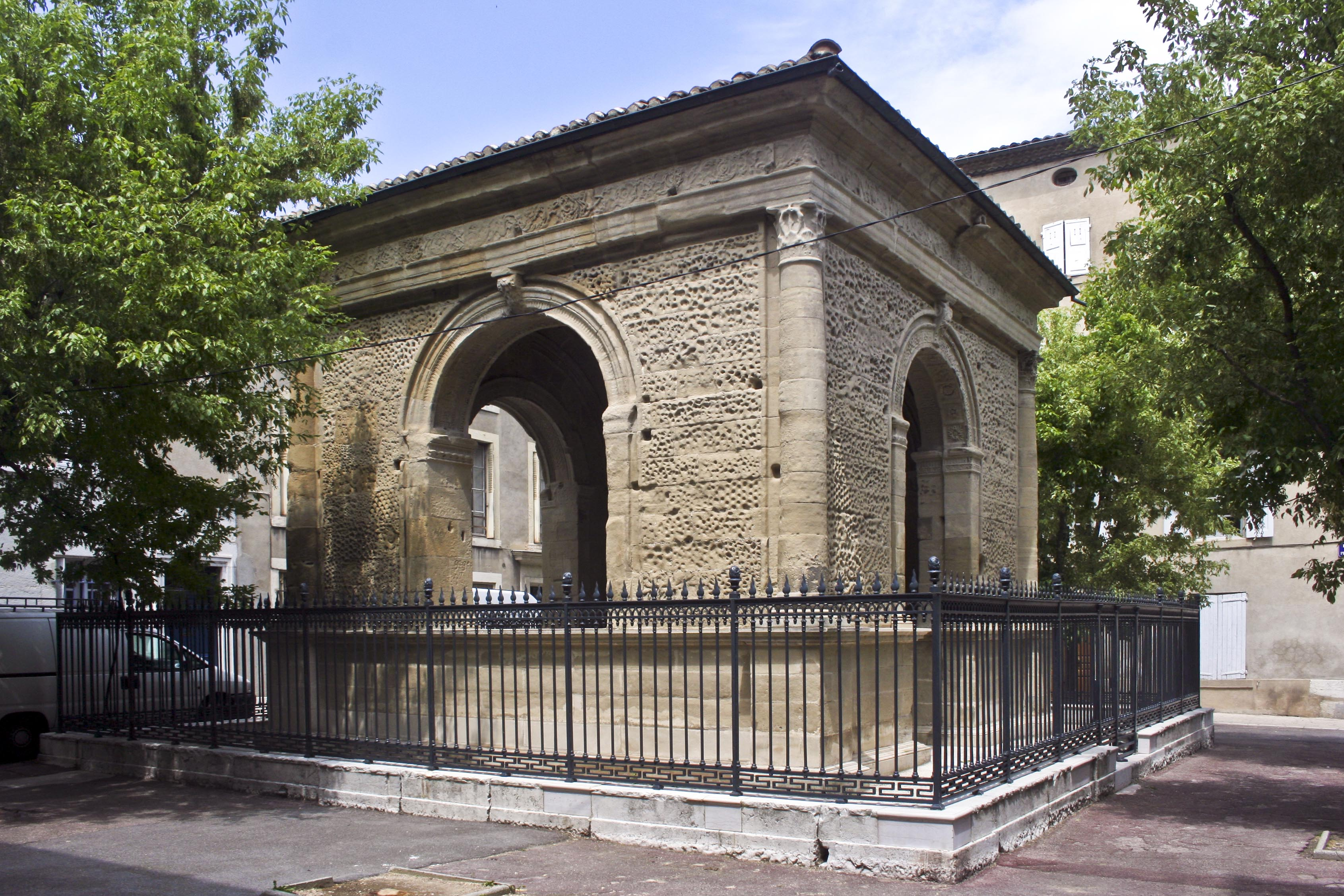 Le Pendentif à Valence, Drôme, France